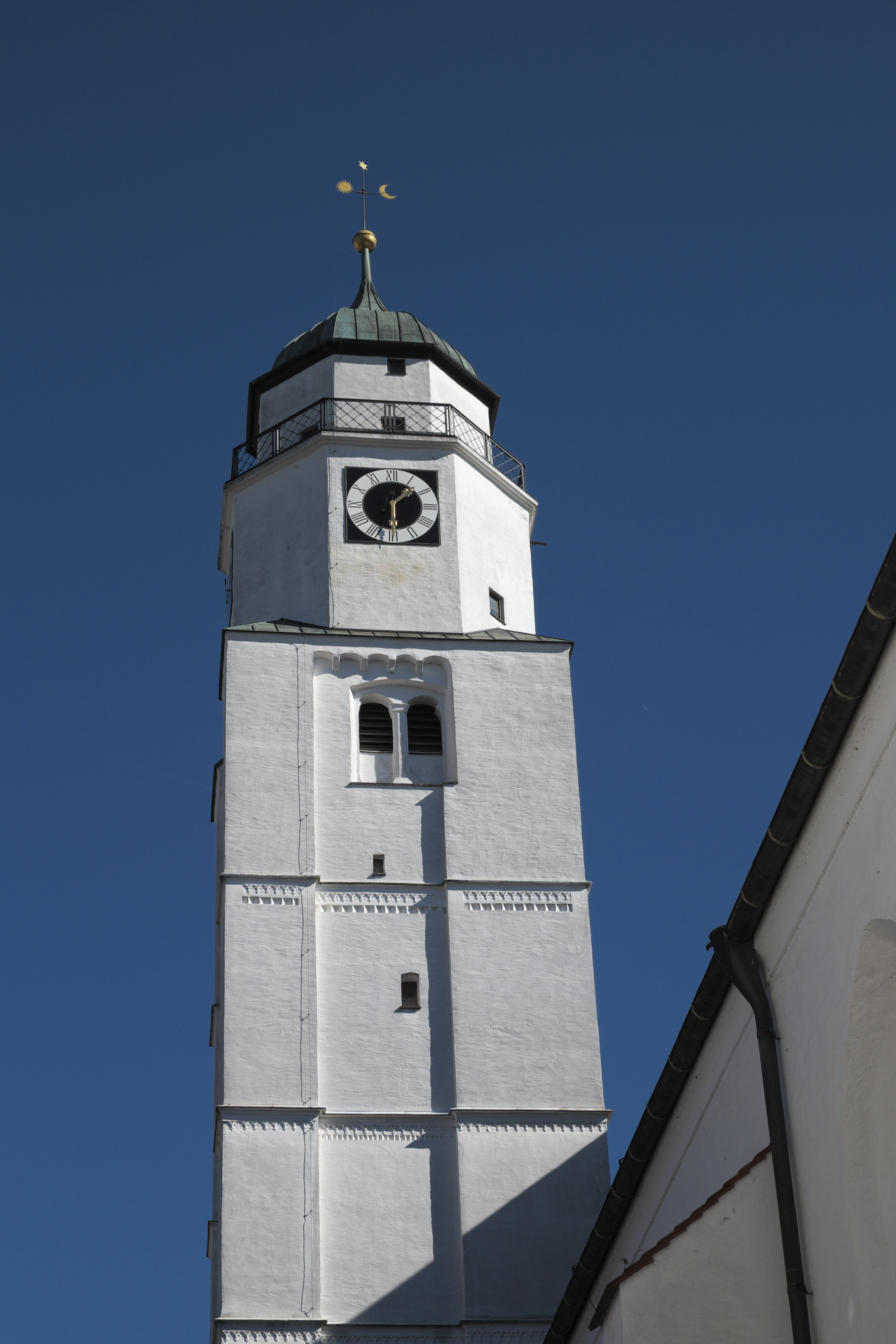 Katholische Stadtpfarrkirche Mariä Himmelfahrt in Höchstädt im Landkreis Dillingen an der Donau (Bayern), Turm mit welscher Haube